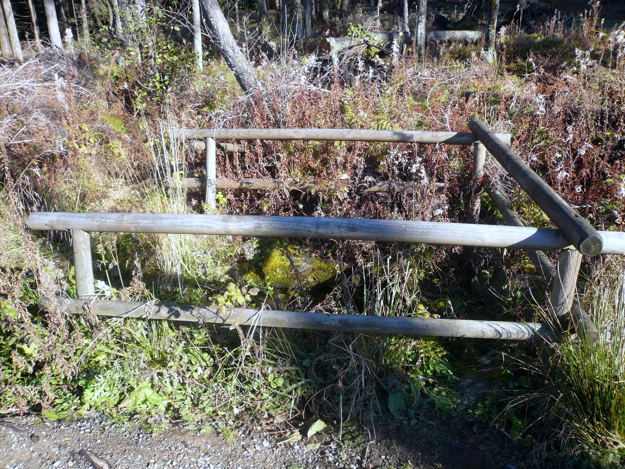 Rotes Moor, Dorfbrunnen